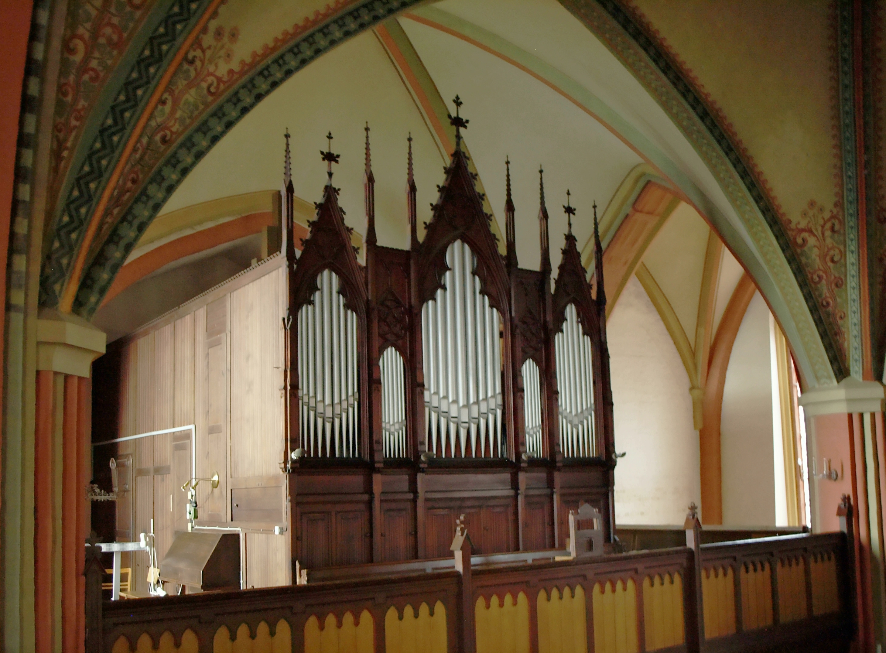 St. Marien-Kirche Boizenburg, Friese III. Orgel (II/P/19).